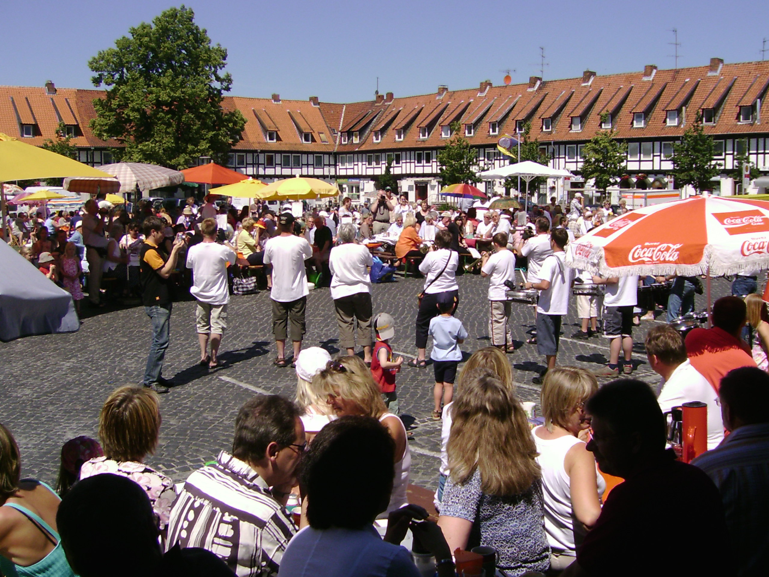 Südstadt-Frühstück 2006